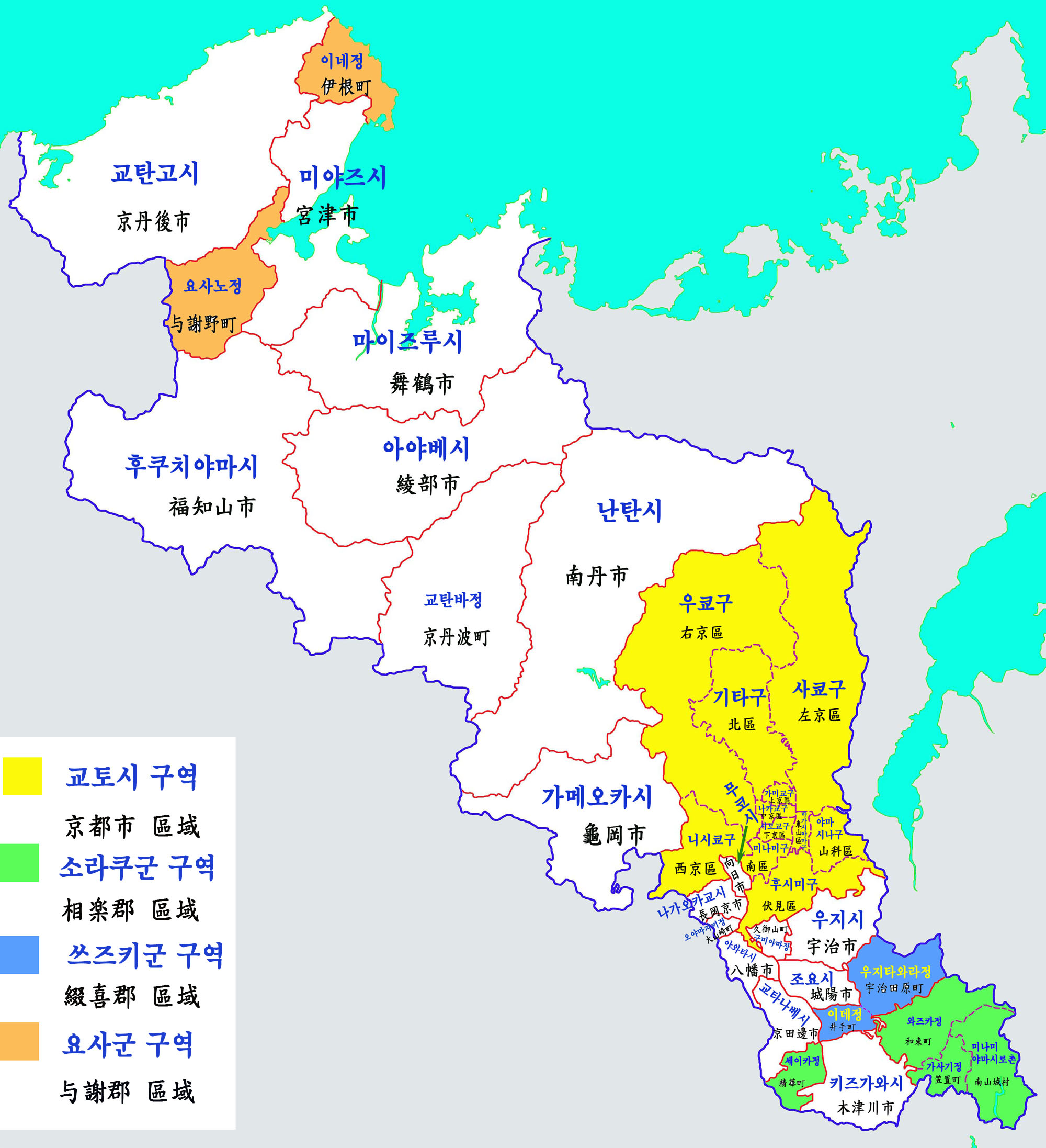 교토부 행정구역